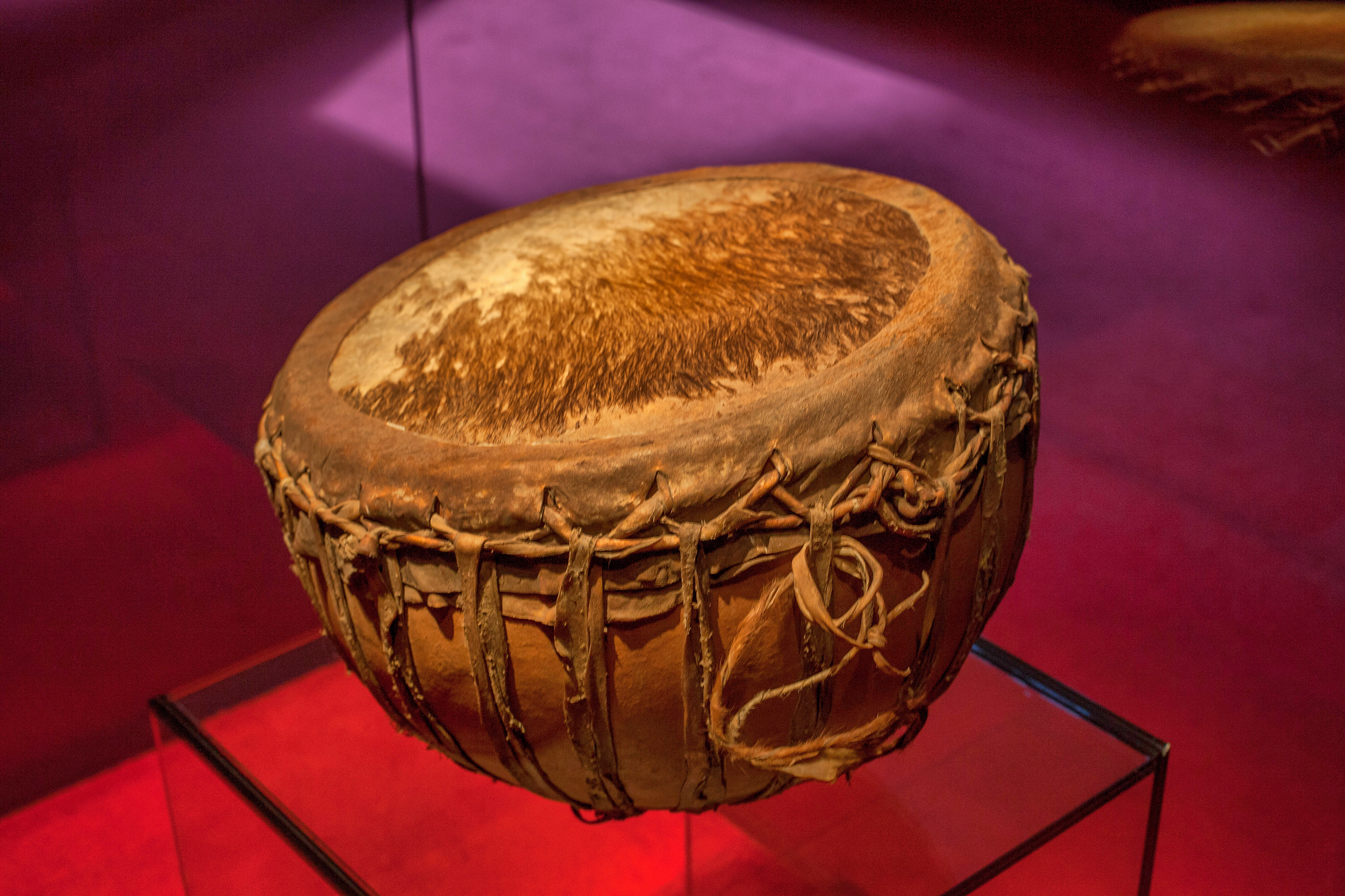 Nagara, principis del s. XX, Orissa (Índia), fons del Museu de la Música de Barcelona